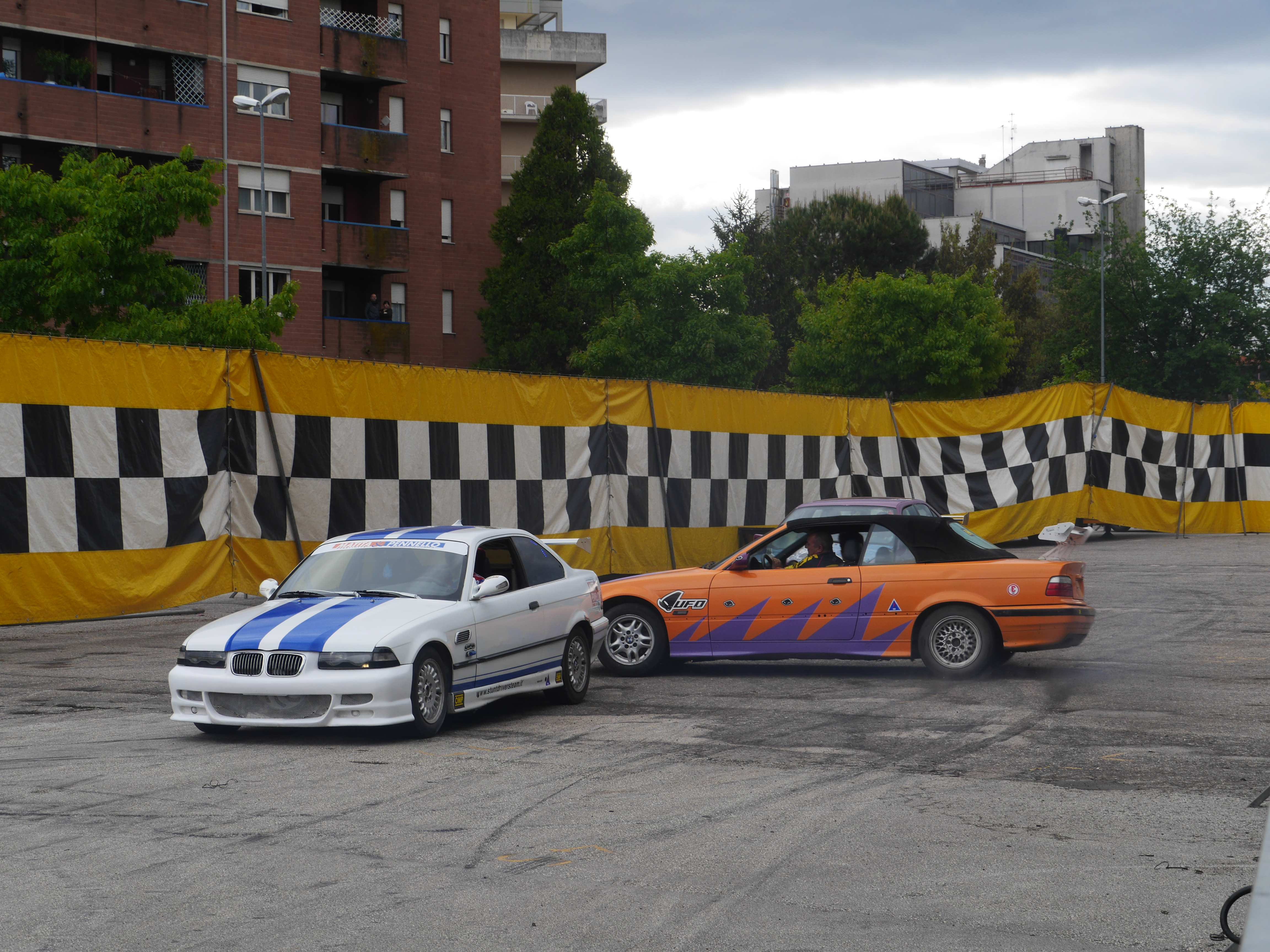 This photo was taken with Panasonic Lumix DMC-GH3 camera, thanks to Panasonic. You can see all photographs in category: Taken with Panasonic Lumix DMC-GH3.